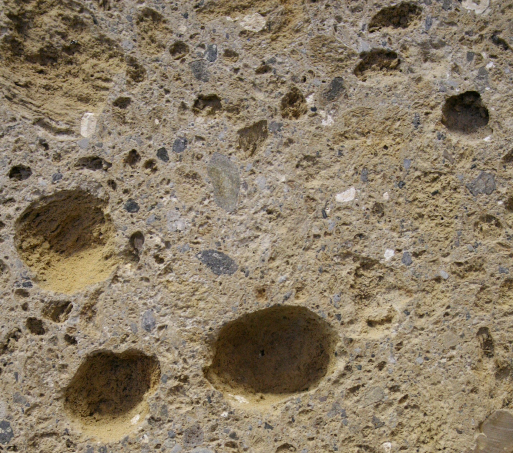 Tufo Giallo aus Viterbo in Italien, Muster ca. 15 x 15 cm